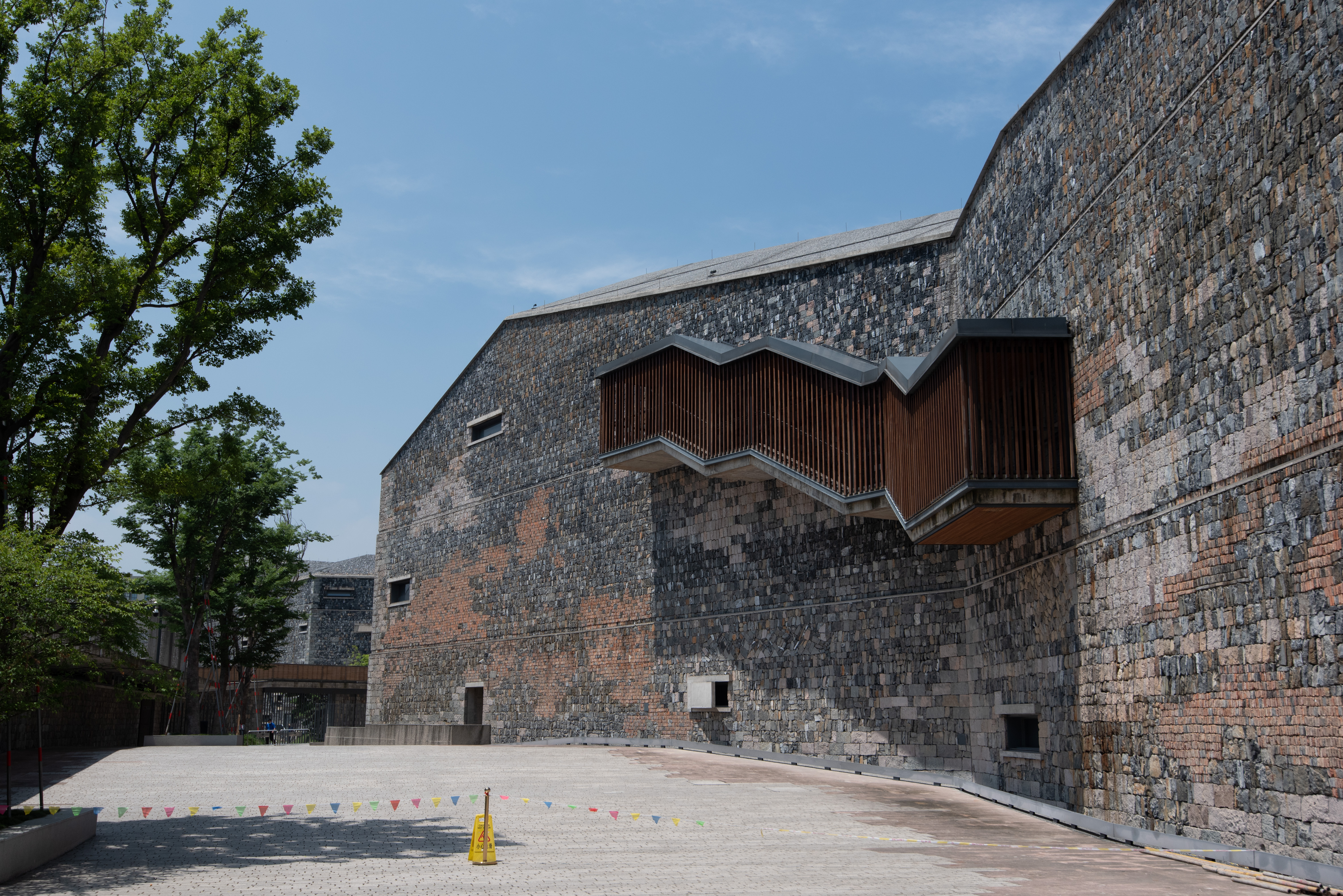 临安博物馆